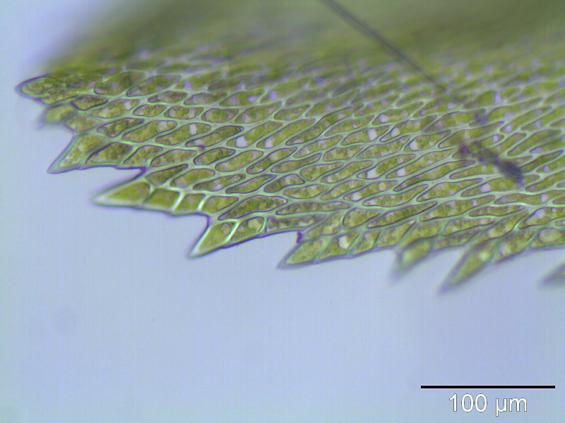 Bäumchen-Leitermoors (Climacium dendroides), Gezähnelte Blattspitze bei 200x Vergr., Rostock